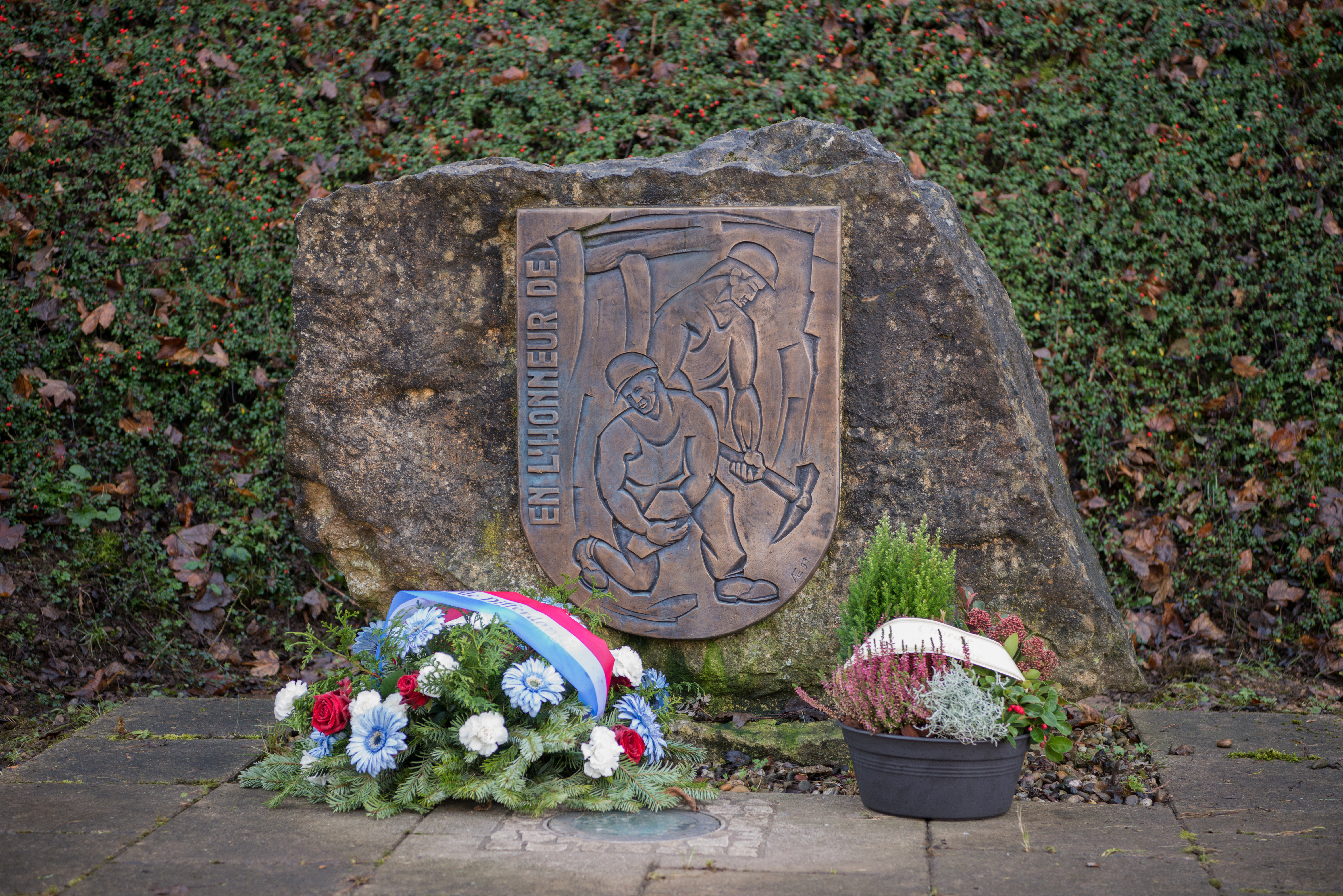 D'Mineure-Monument an der rue Principale zu Zowaasch.